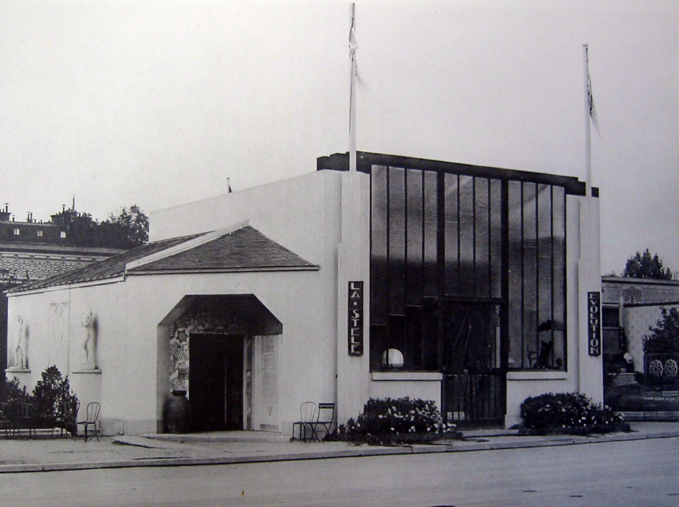 Arthur Goldscheiders Pavillon La Stèle & L’Evolution auf der Ausstellung Exposition internationale des Arts Décoratifs et industriels modernes, Paris 1925